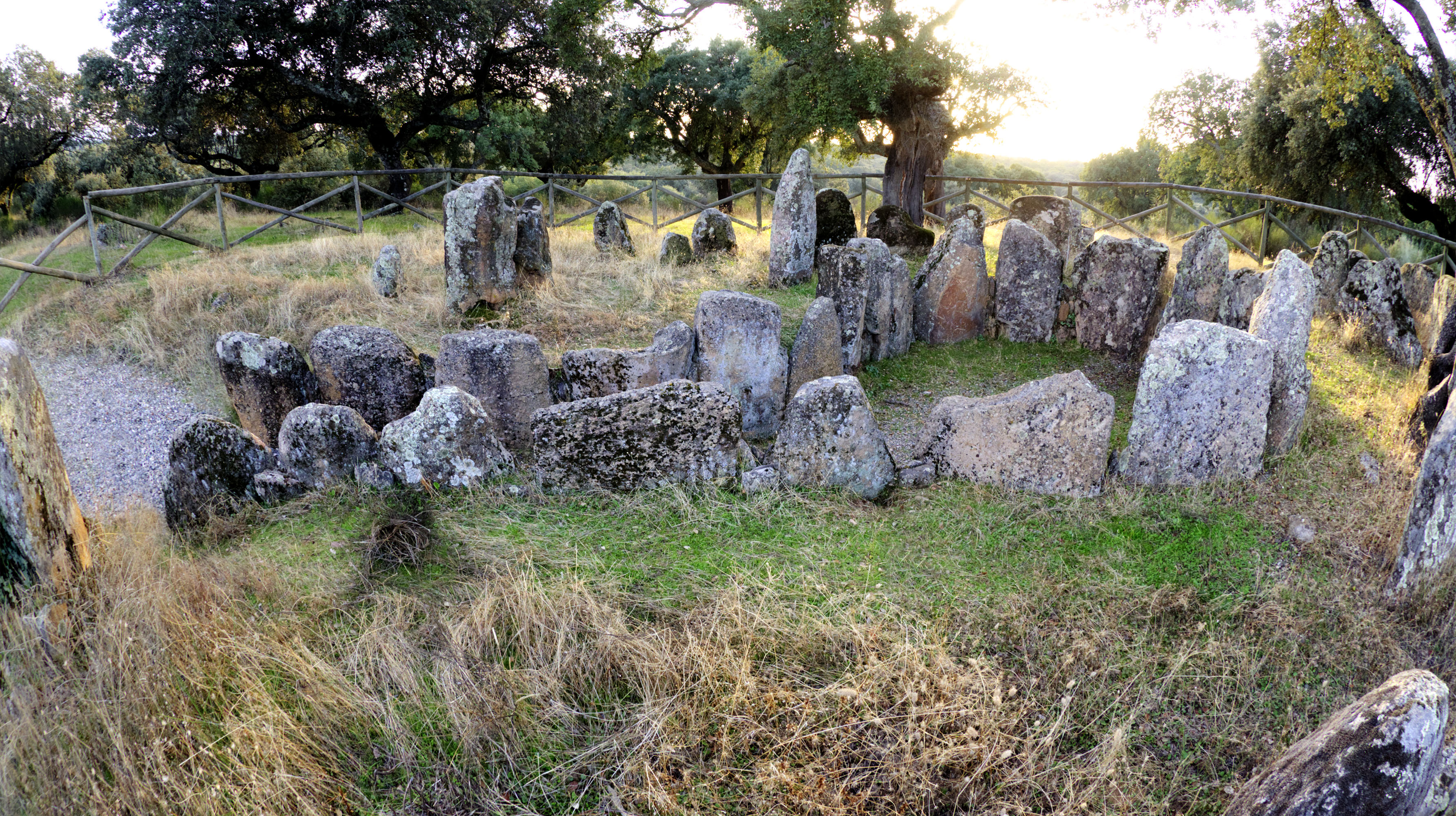 Gran Dolmen, dehesa boyal de Montehermoso, provincia de Cáceres, España